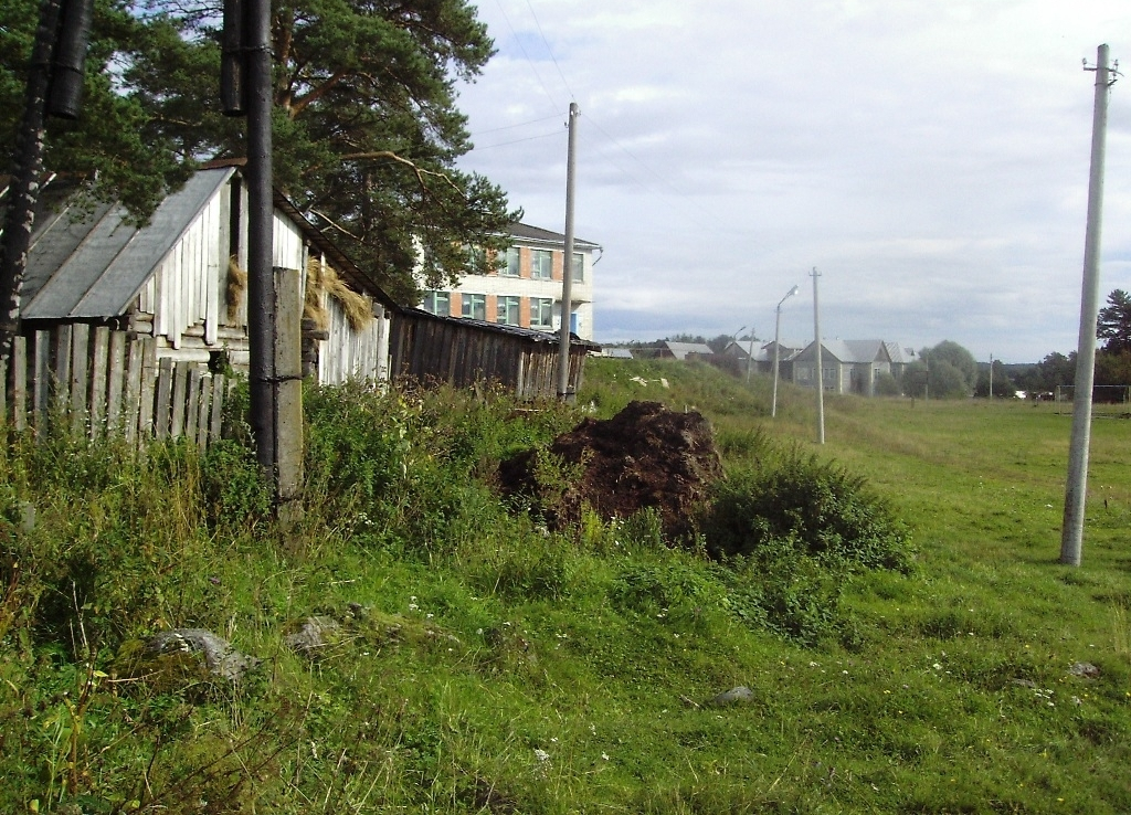 поселок Хаапалампи